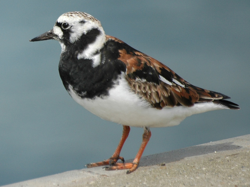 Un tournepierre à collier